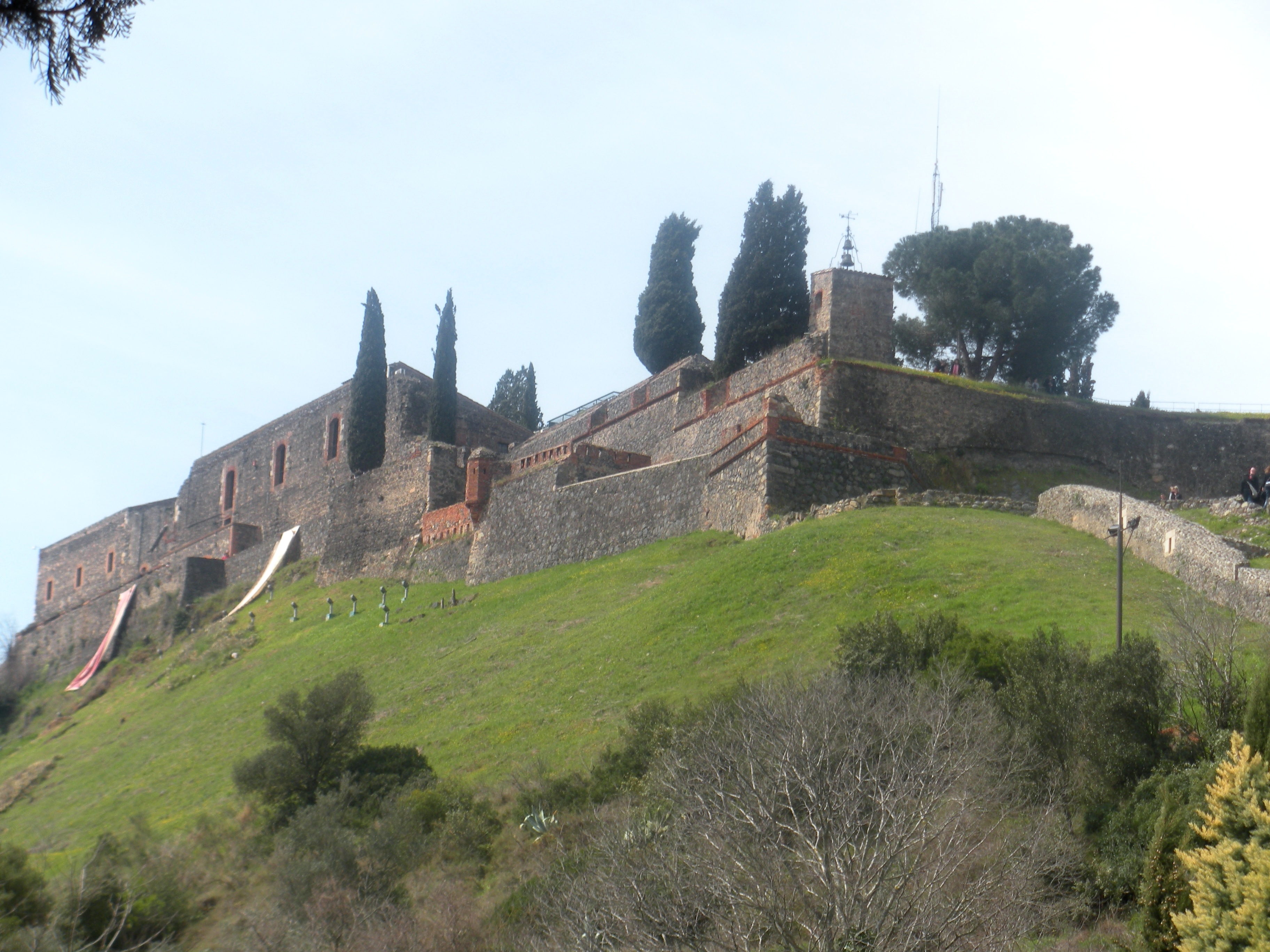 Castell d'Hostalric